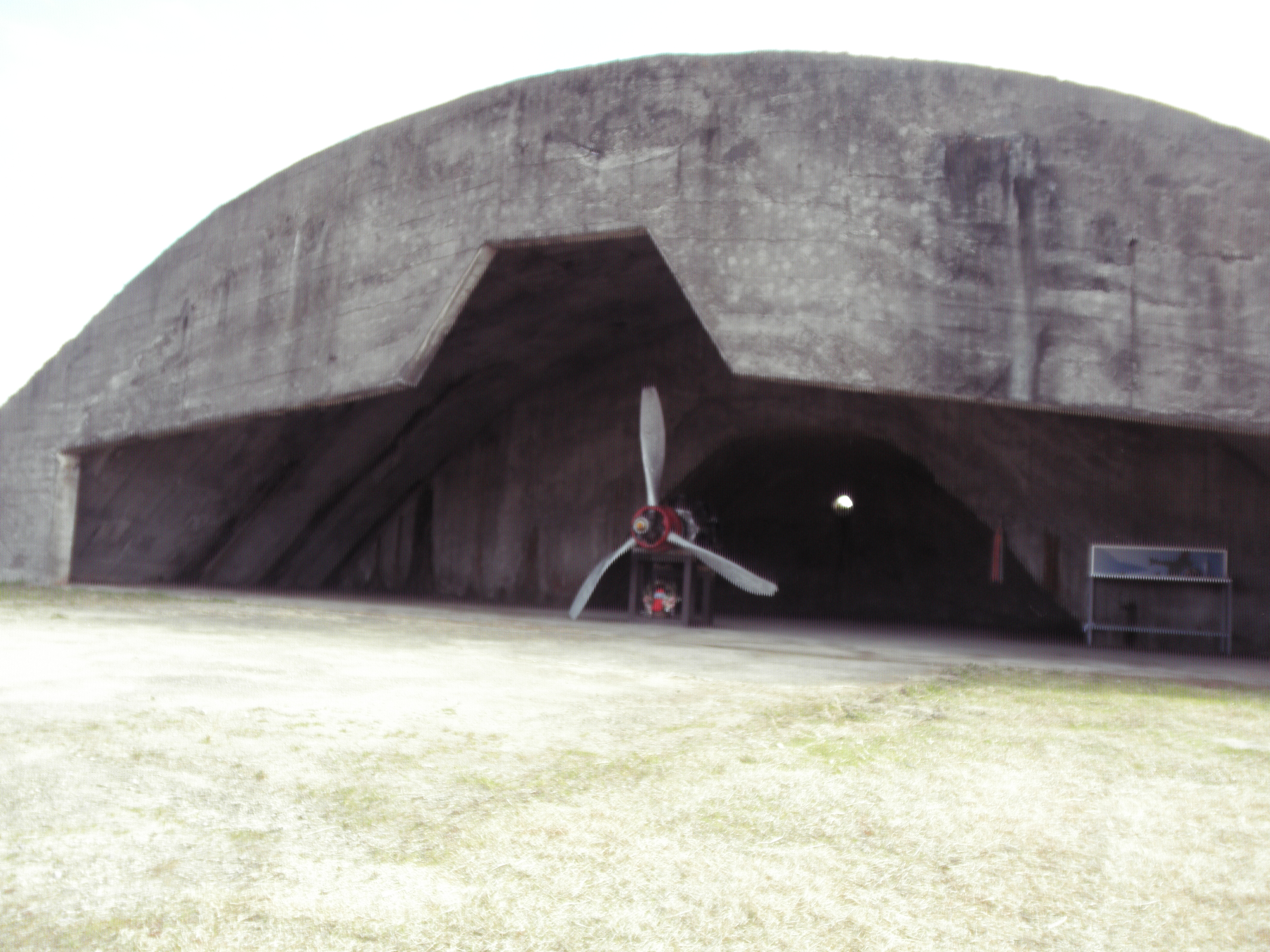 城井1号掩体壕、正面アップ気味で撮影しました。中に何があるのかだいたいわかります。